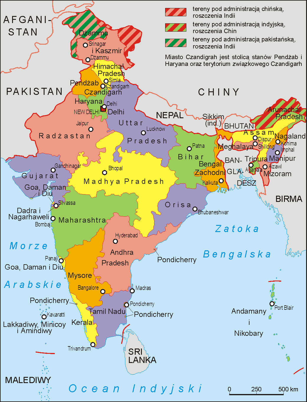 Podział administracyjny Indii w 1972 roku. Autor Aotearoa